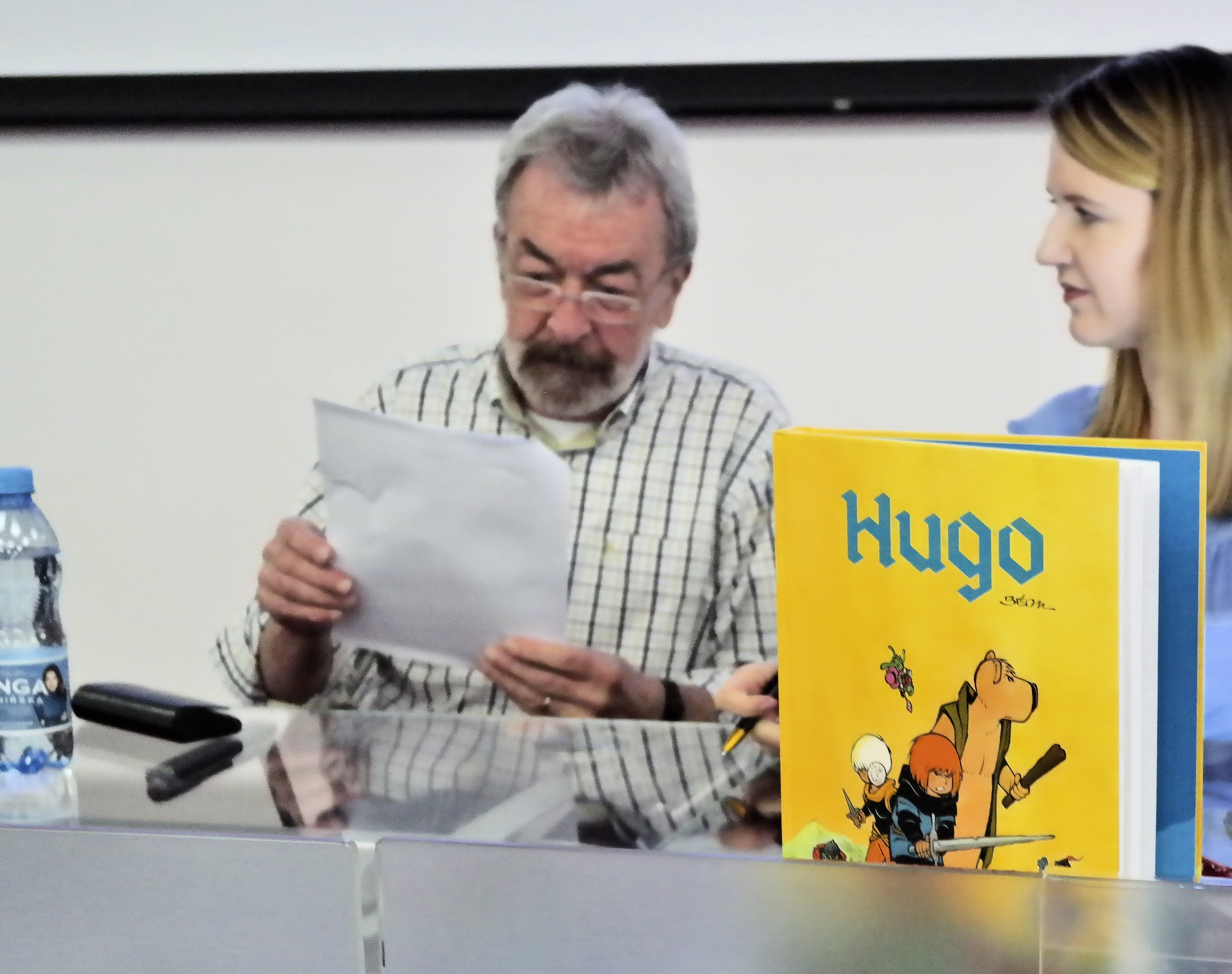 Bernard "Bedu" Dumont, Pyrkon, Poznań